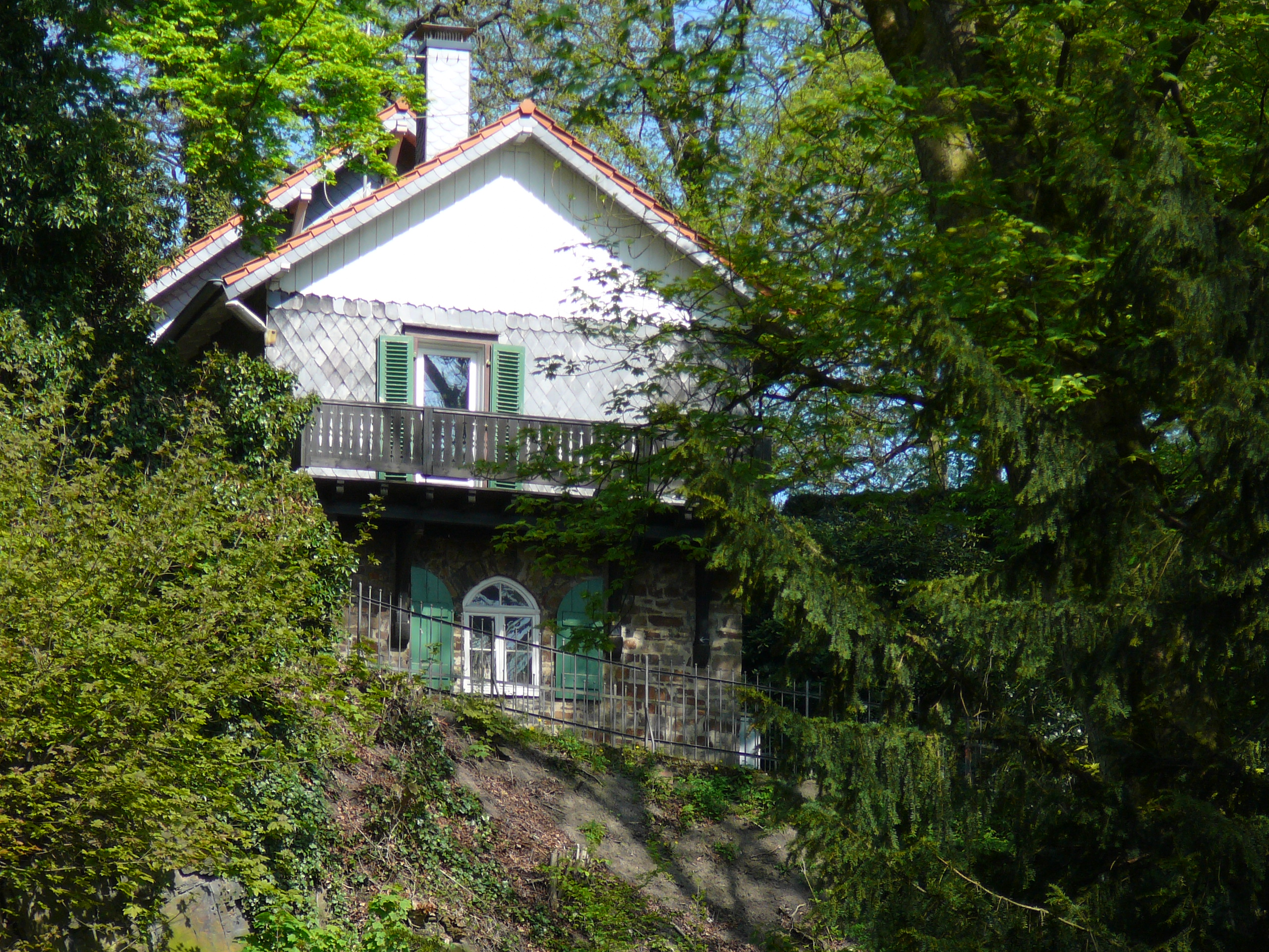 Hardt-Anlagen, Wuppertal